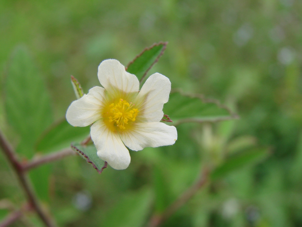 Sida rhombifolia L. - MALVACEAE - Parque Vivencial Asa Norte - Brasília - Distrito Federal - Brasil.